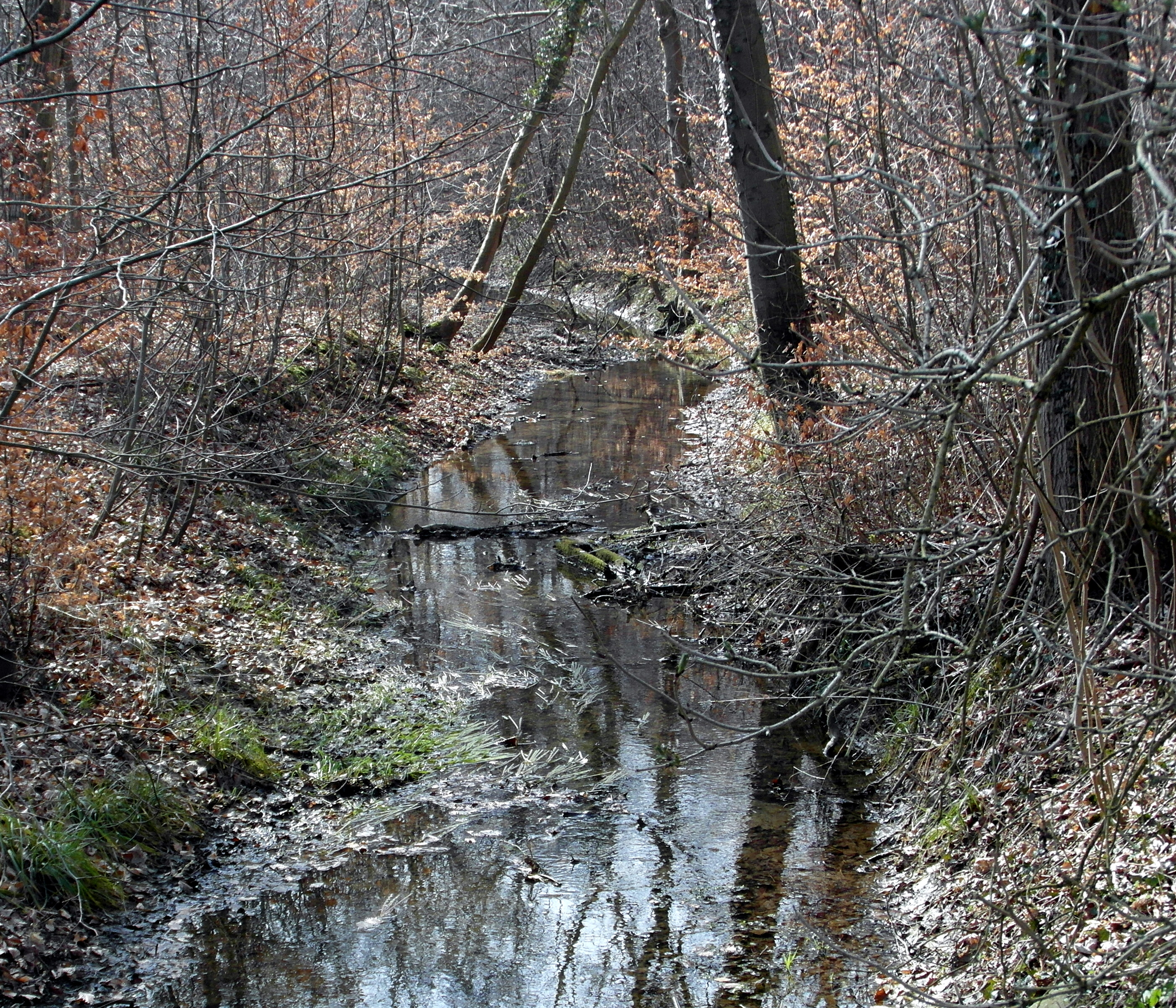 Die Kirchwehrener Landwehr nach Querung der K248 im Großen Holz in der Region Hannover